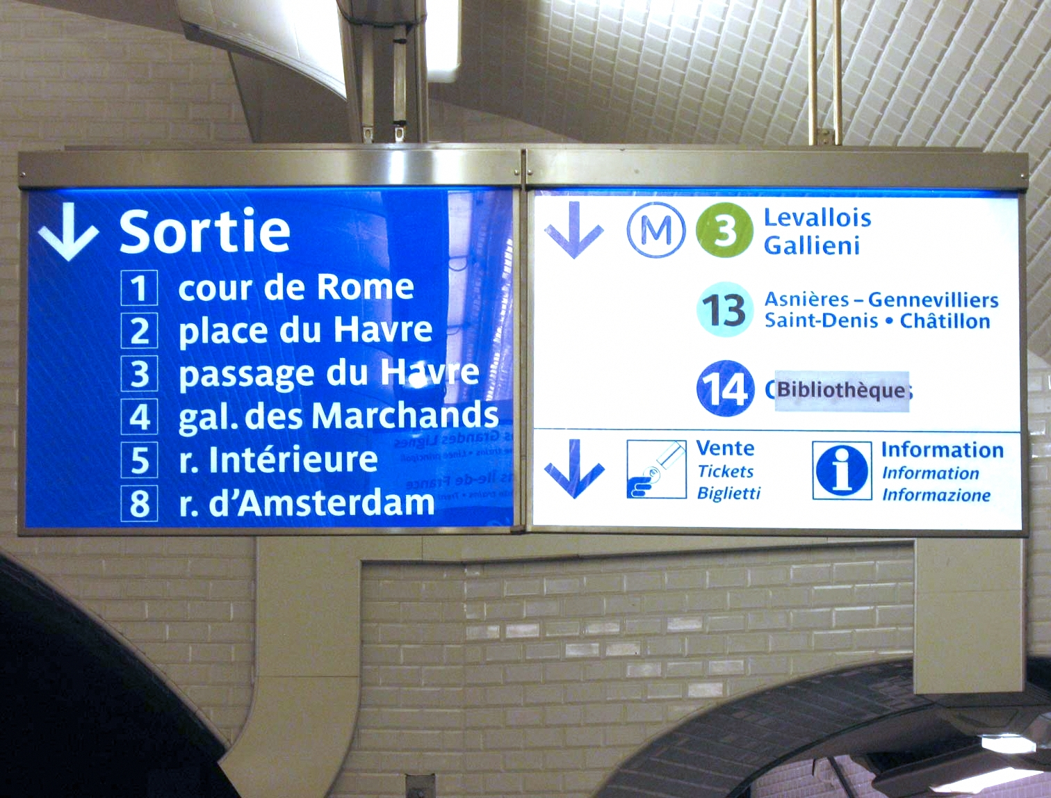 Signalétique du Métro de Paris, Station Saint-Lazare (ligne 12), Paris, France